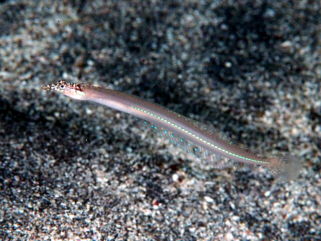 クロエリギンポ Trichonotus filamentosus